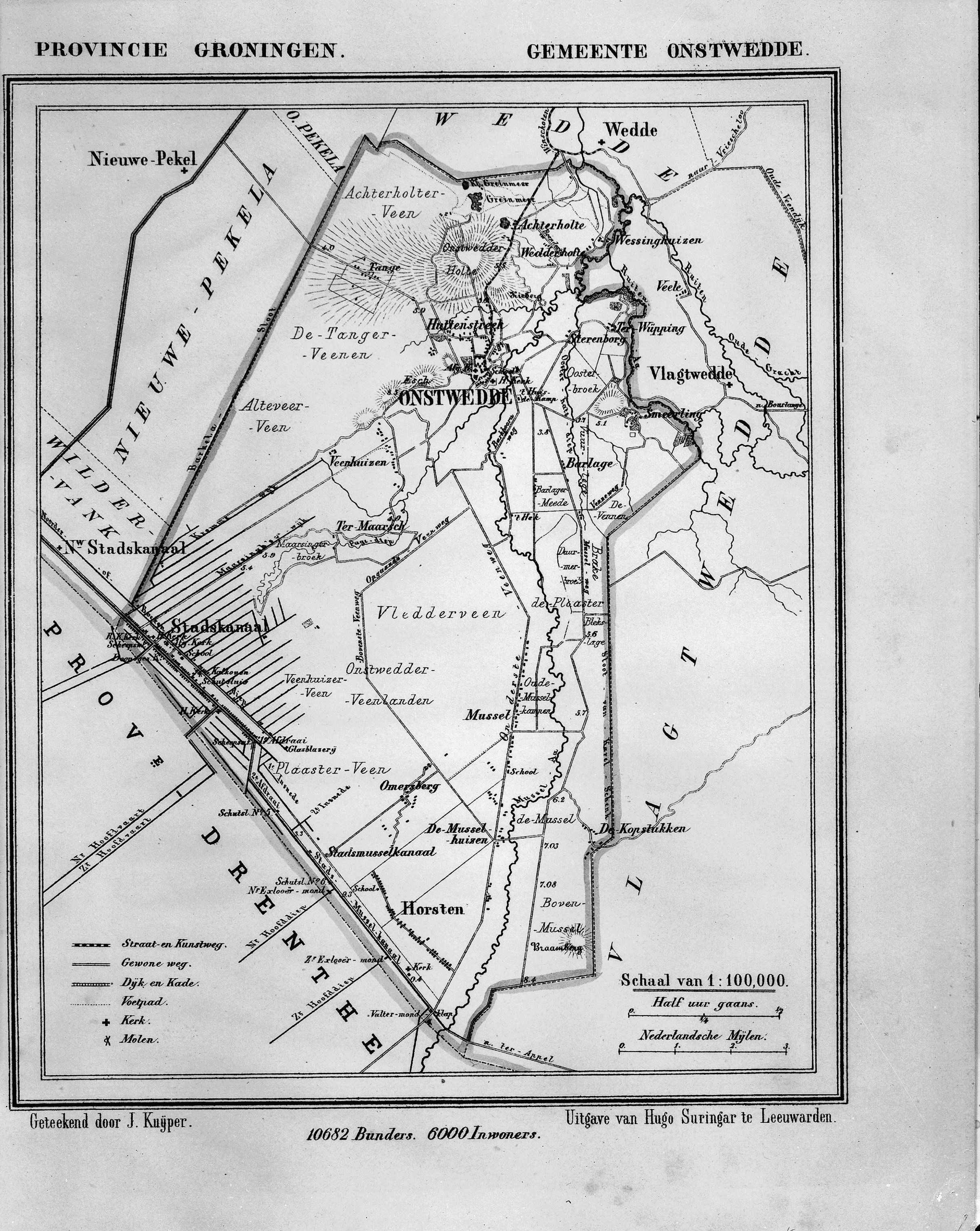 plattegrond